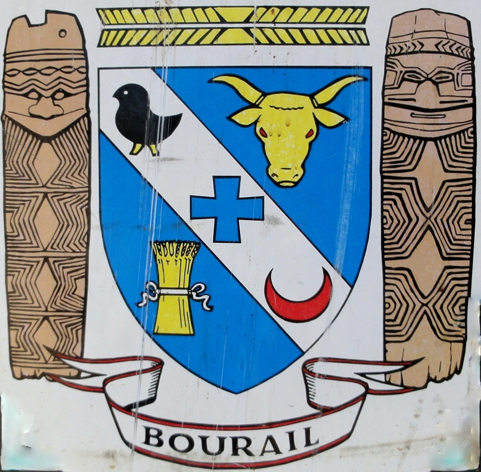 Blason de Bourail